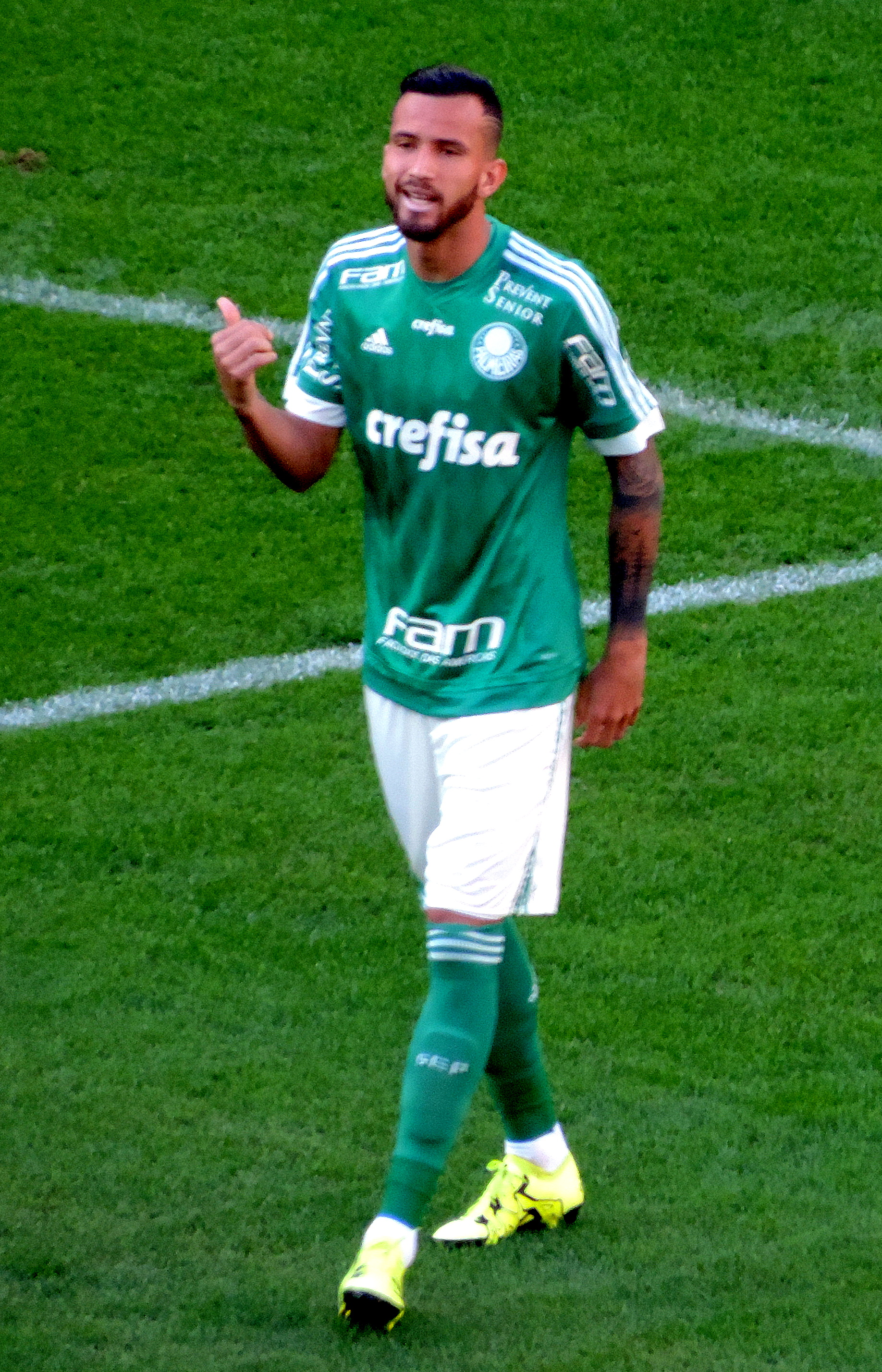 Leandro Pereira. Foto: Roberto Sabino